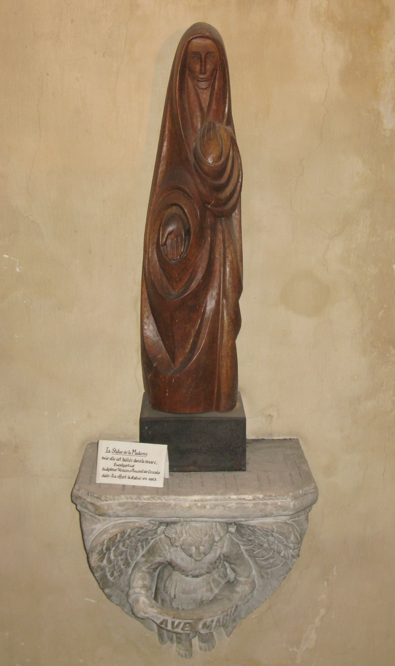 Statue de la Madone, bois d'eucalyptus, cathédrale de Vence, 1953, artiste: Jean Vincent de Crozals